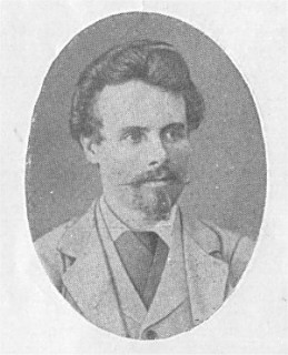 Грачевский Михаил Фёдорович - русский революционер, член партии "Народная воля", террорист